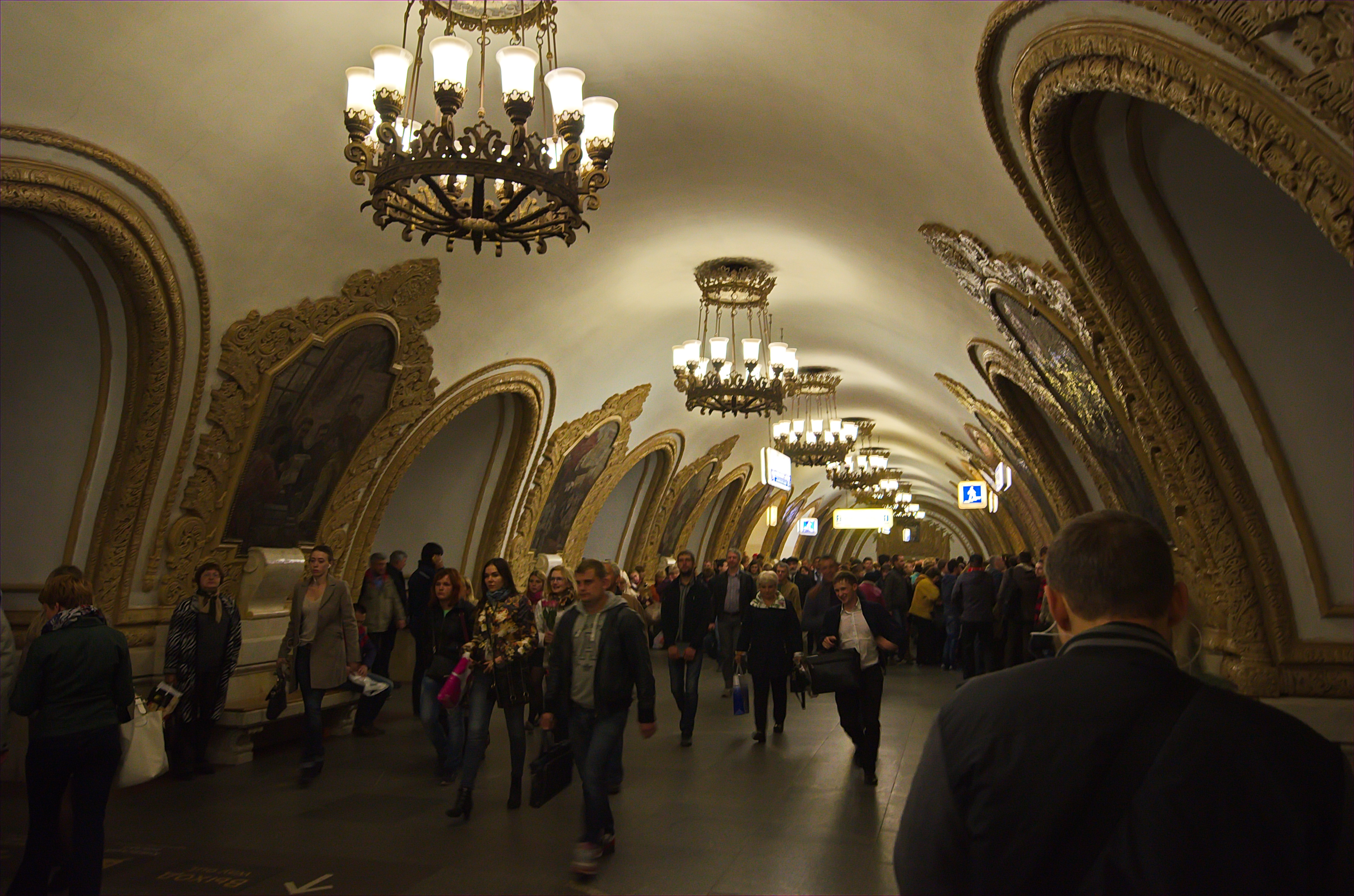 0847 - Moskau 2015 - Metrostation Kiewskaja